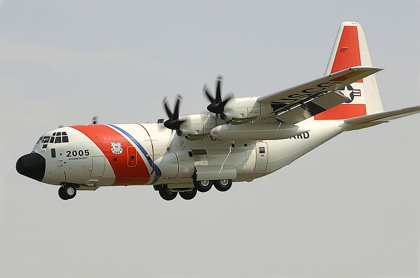 Hercules - RIAT 2005